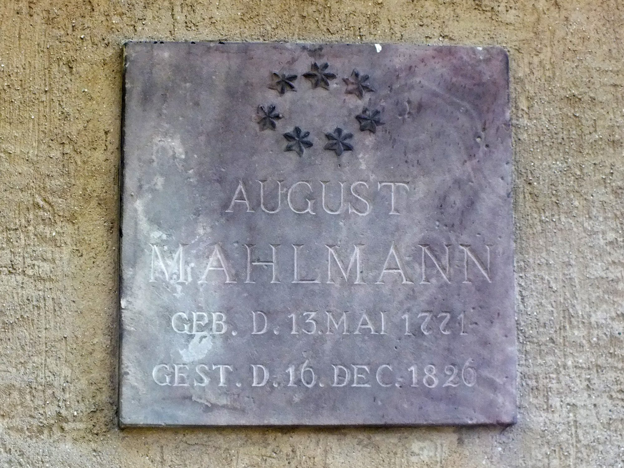 Die Grabplatte für August Mahlmann an einer Wand des Alten Johannisfriedhofs in Leipzig